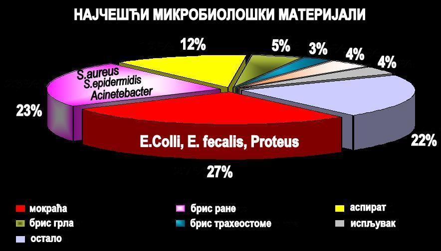 Najčešći mikrobiološki materijali u hospitalnim (bolničkim) infekcijama